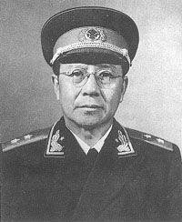 贺诚中将1958年授衔照